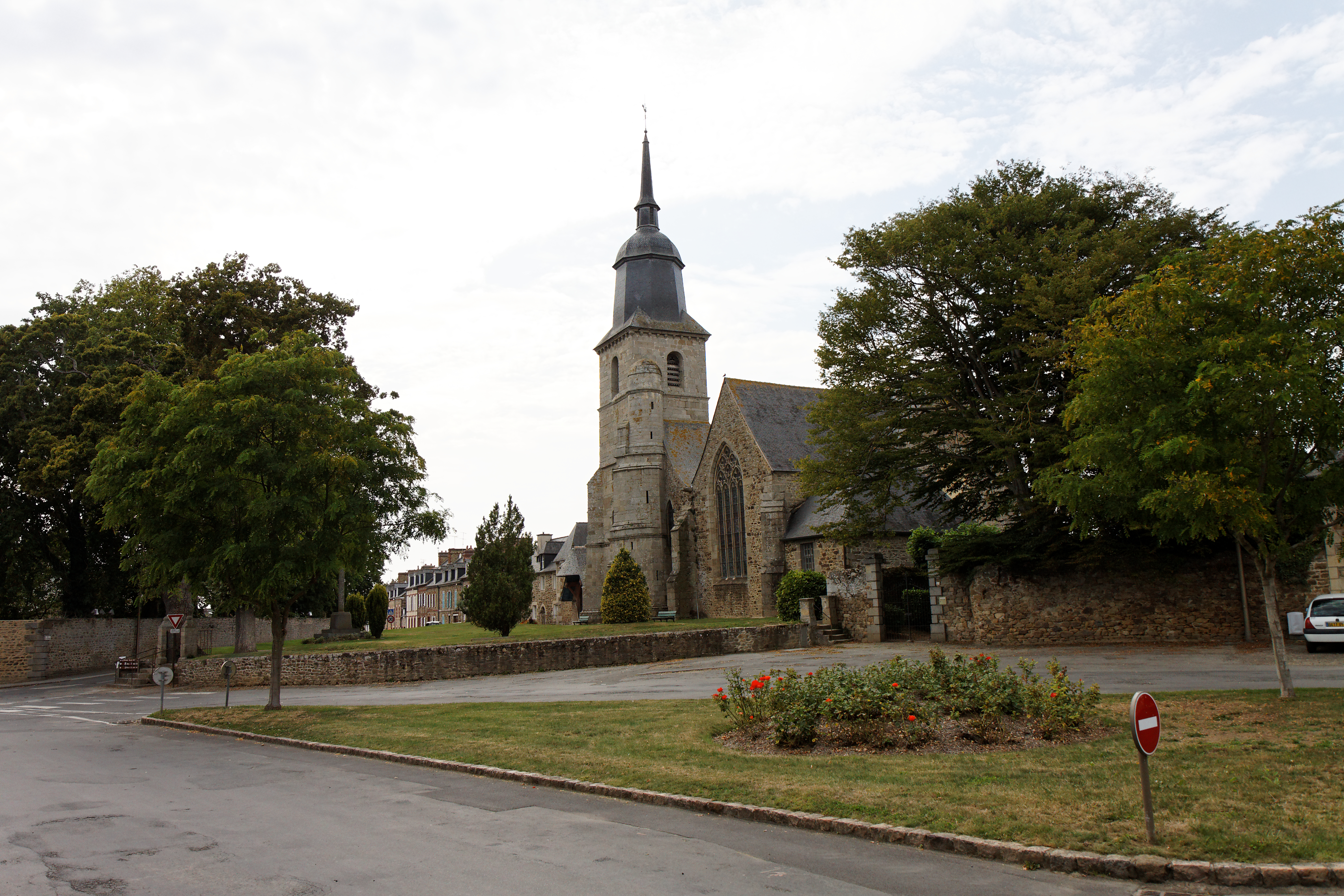 L'église Saint-Martin à Lamballe (Côtes d'Armor).